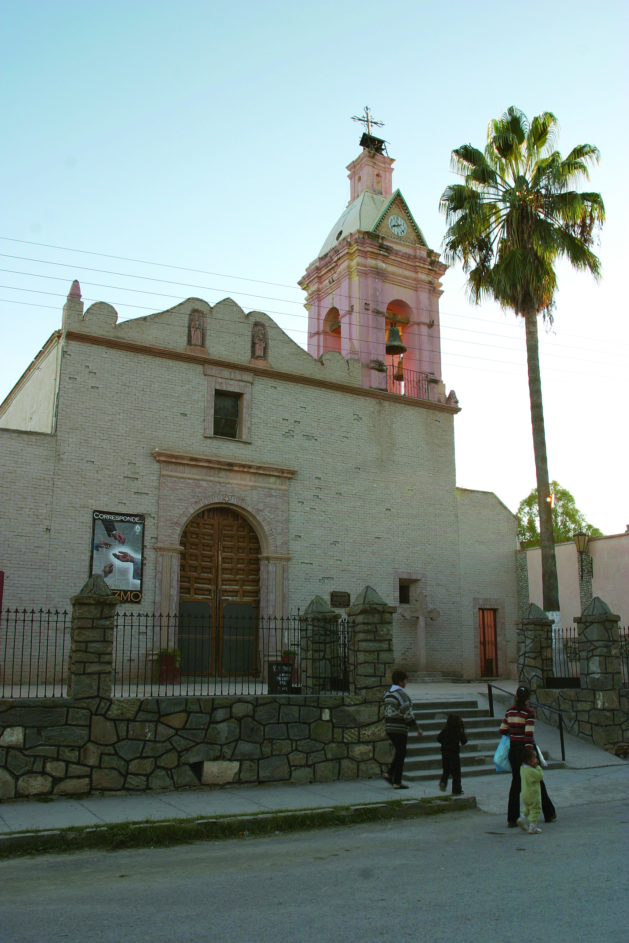 Templo de San Francisco de Asís, General Cepeda, Coahuila/ San Francisco de Asís temple